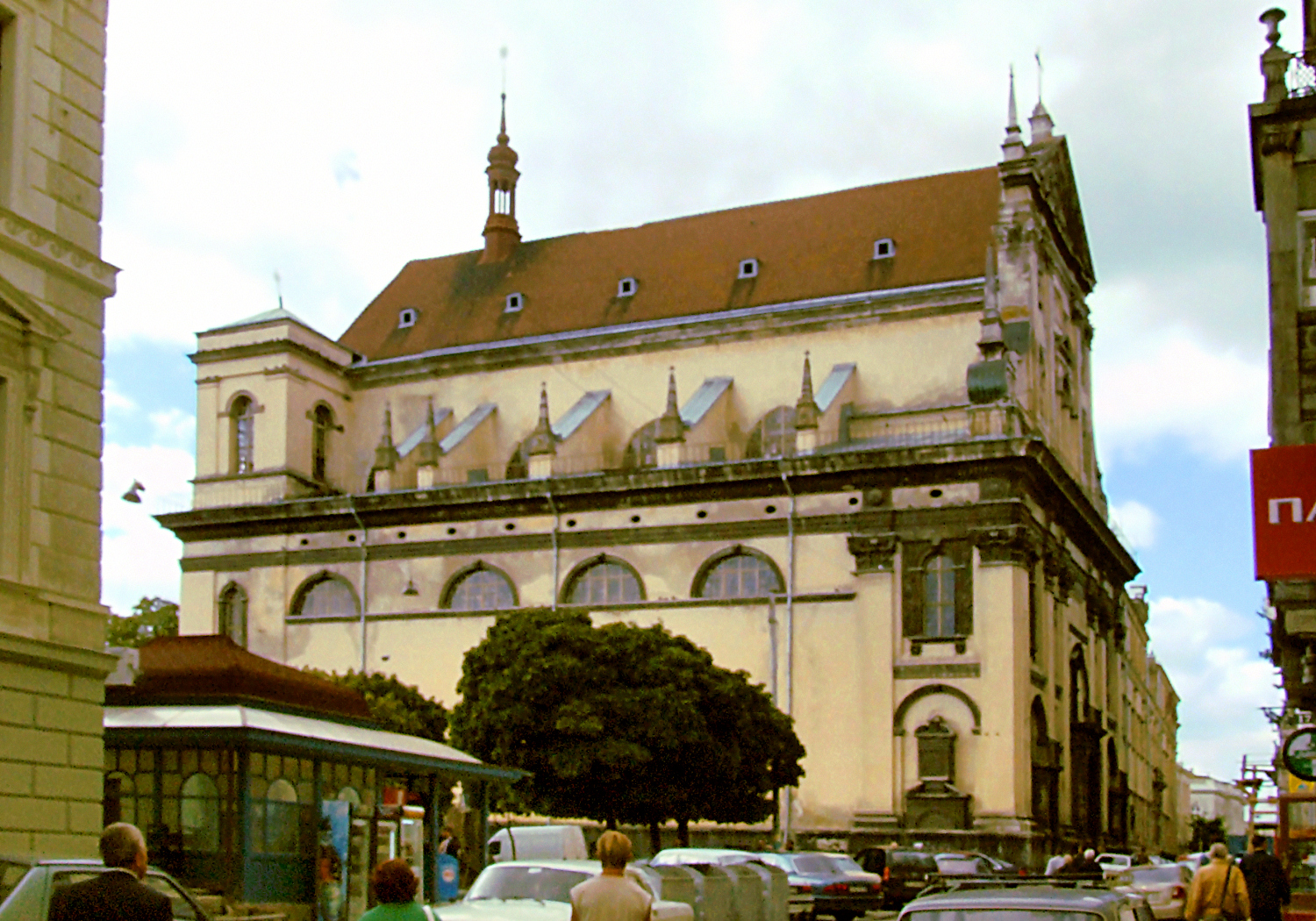 Lwów; Kościół pw. św. Piotra i Pawła [Jezutiów] (Sts. Peter and Paul Roman Catholic Church [Jesuit])